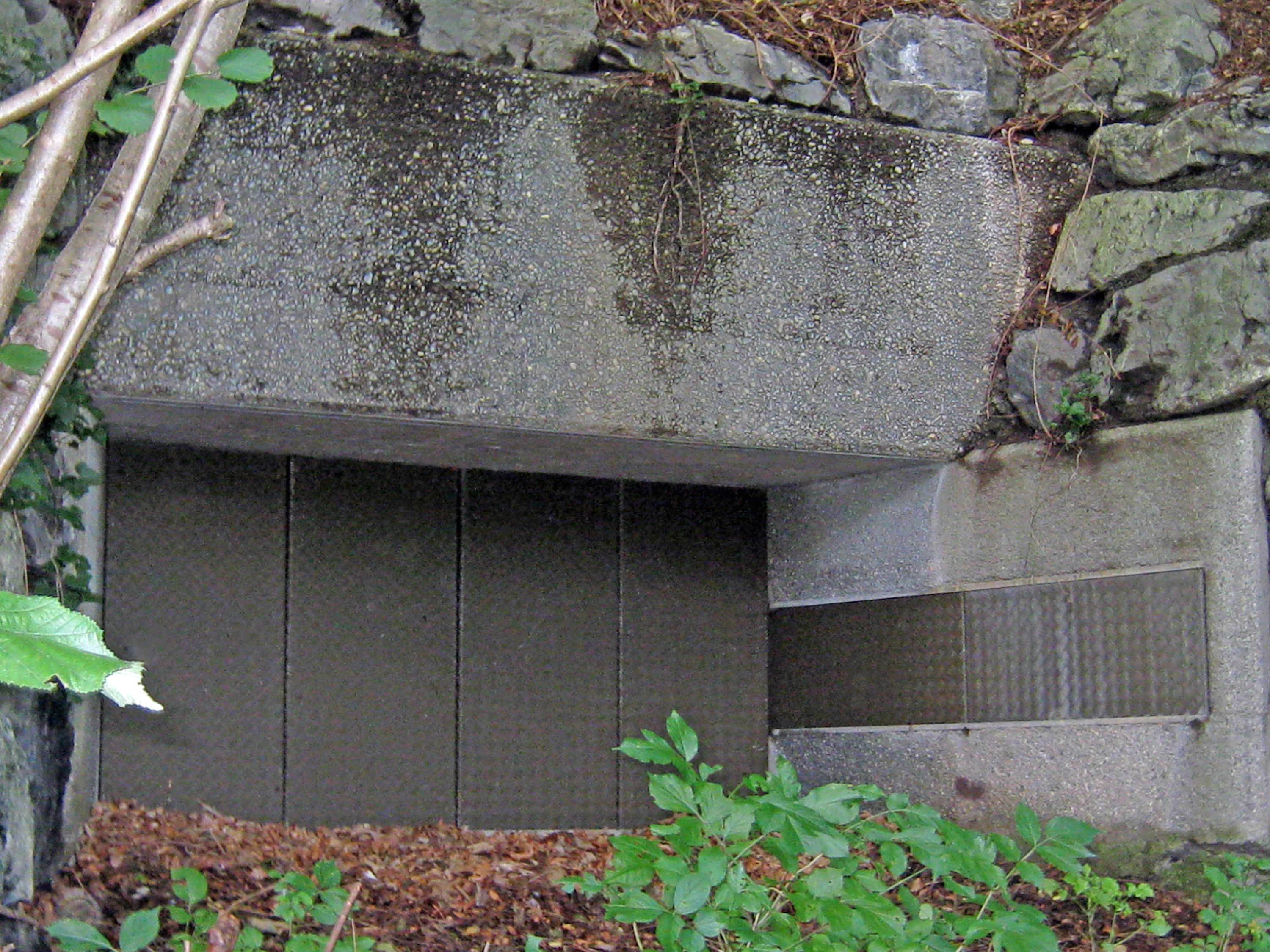 Centi Bunker A 6182 Schollberg Nord, Sargans, Kanton St. Gallen